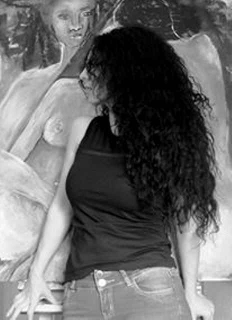 Portrait von Darin Ahmad